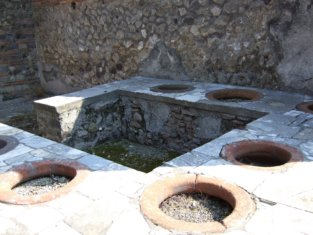 Thermopolium in Pompeji